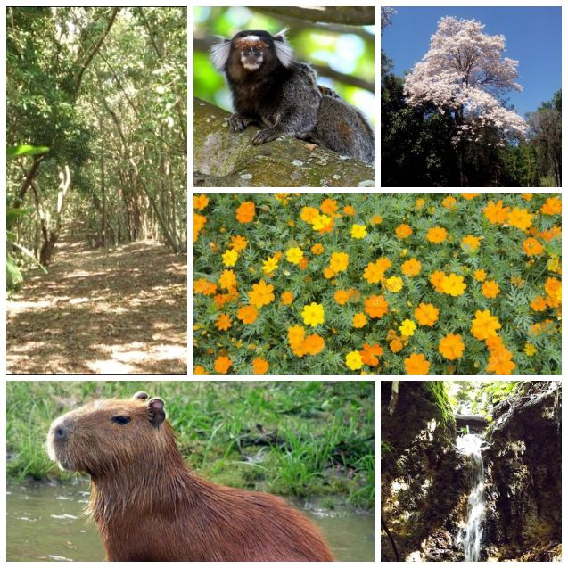 Montagem de fotos do Parque Ecológico, incluindo Fauna e Flora.